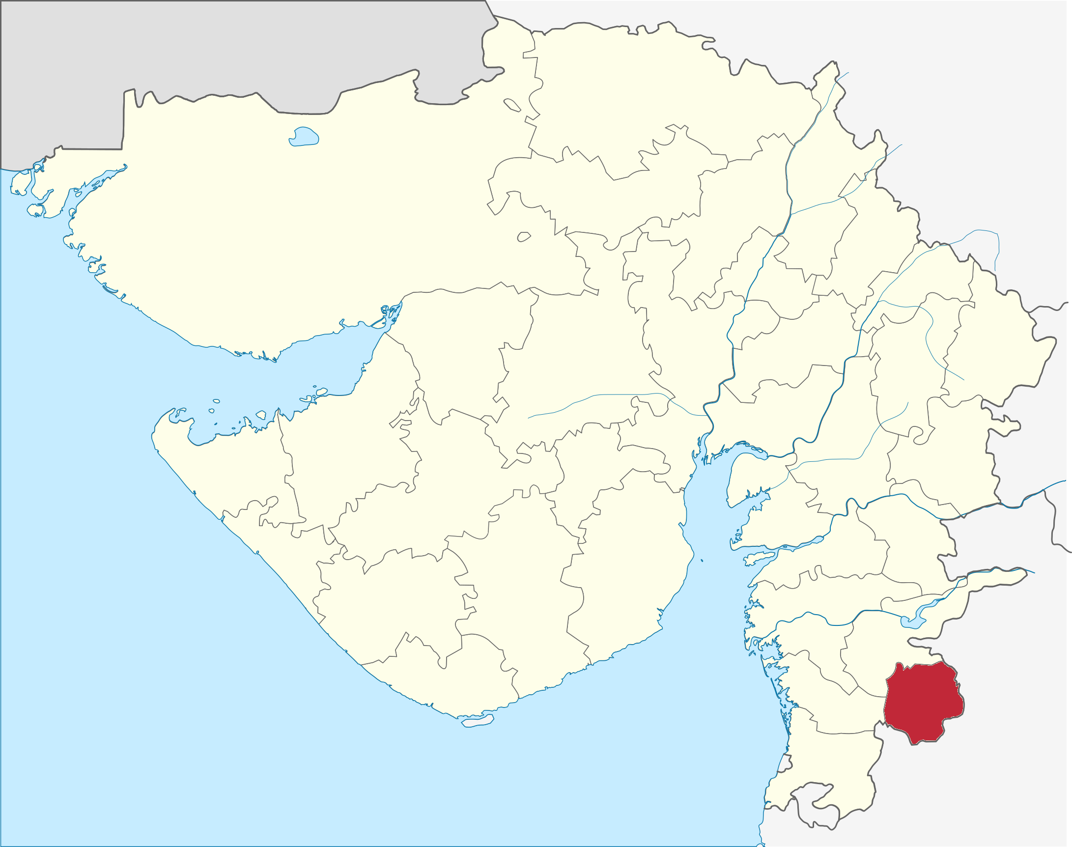 Distrito de Dangs en Gujarat